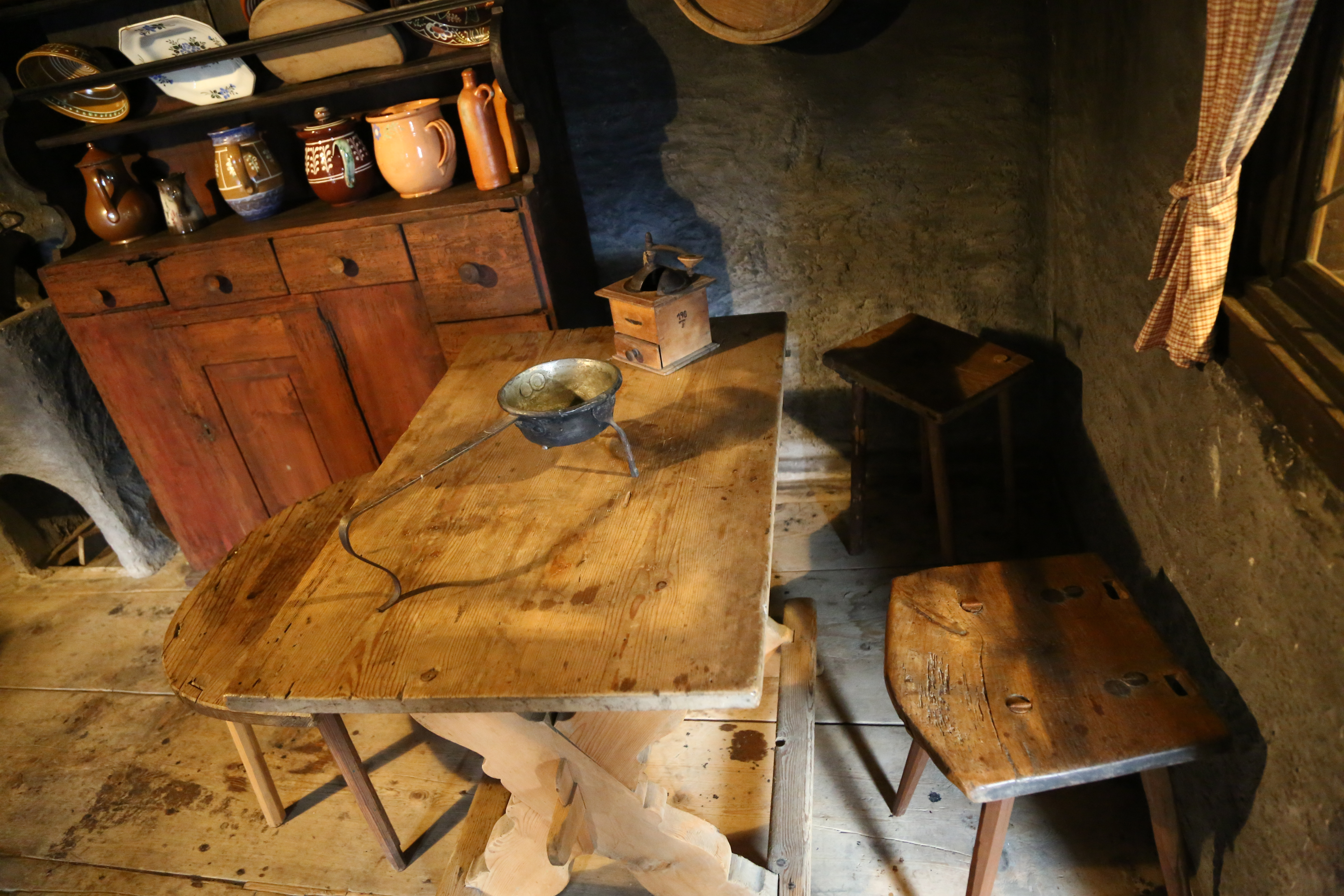 Walserhaus Triesenberg, Innenraum